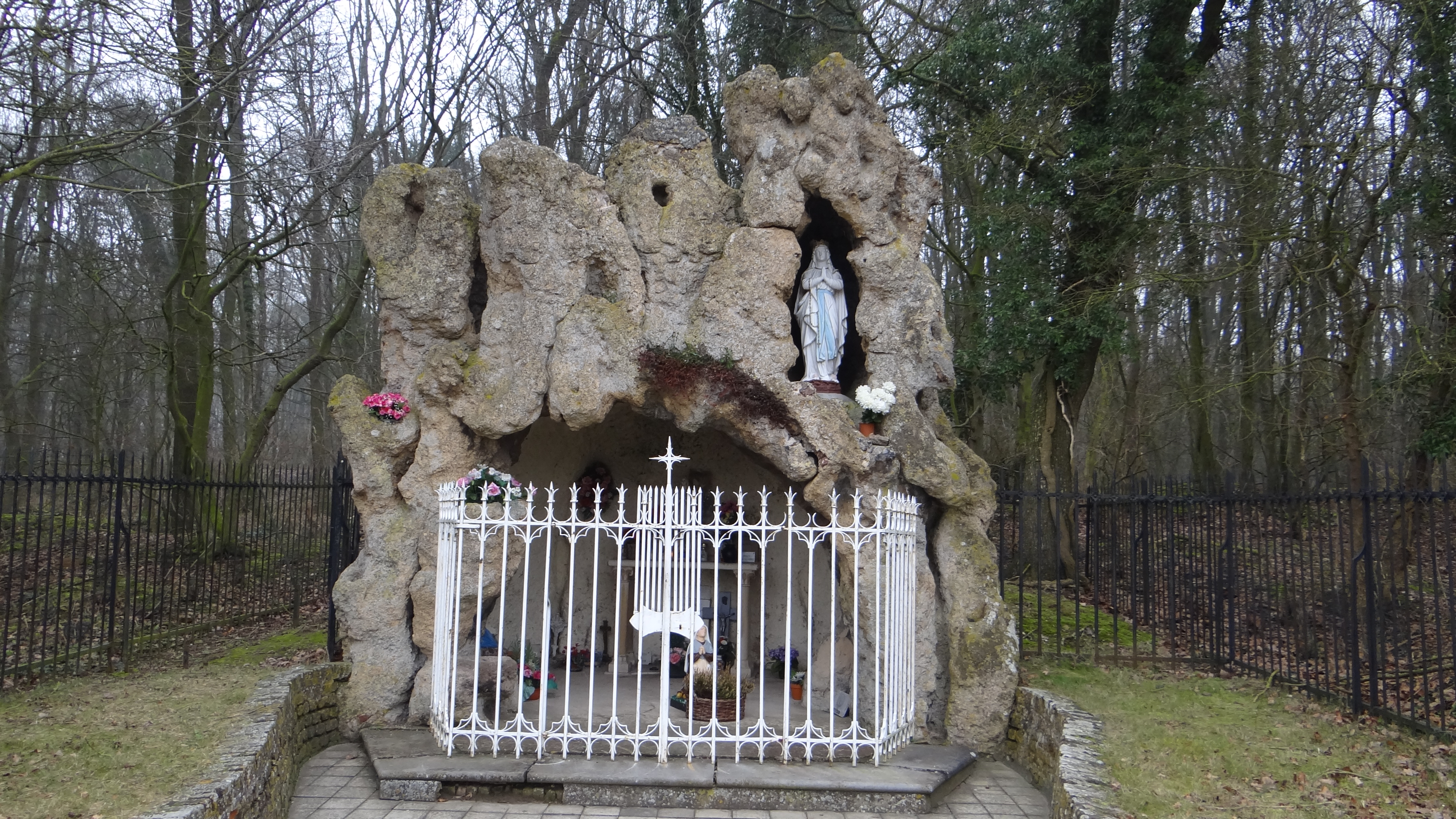 Lécluse - Grotte Mariale